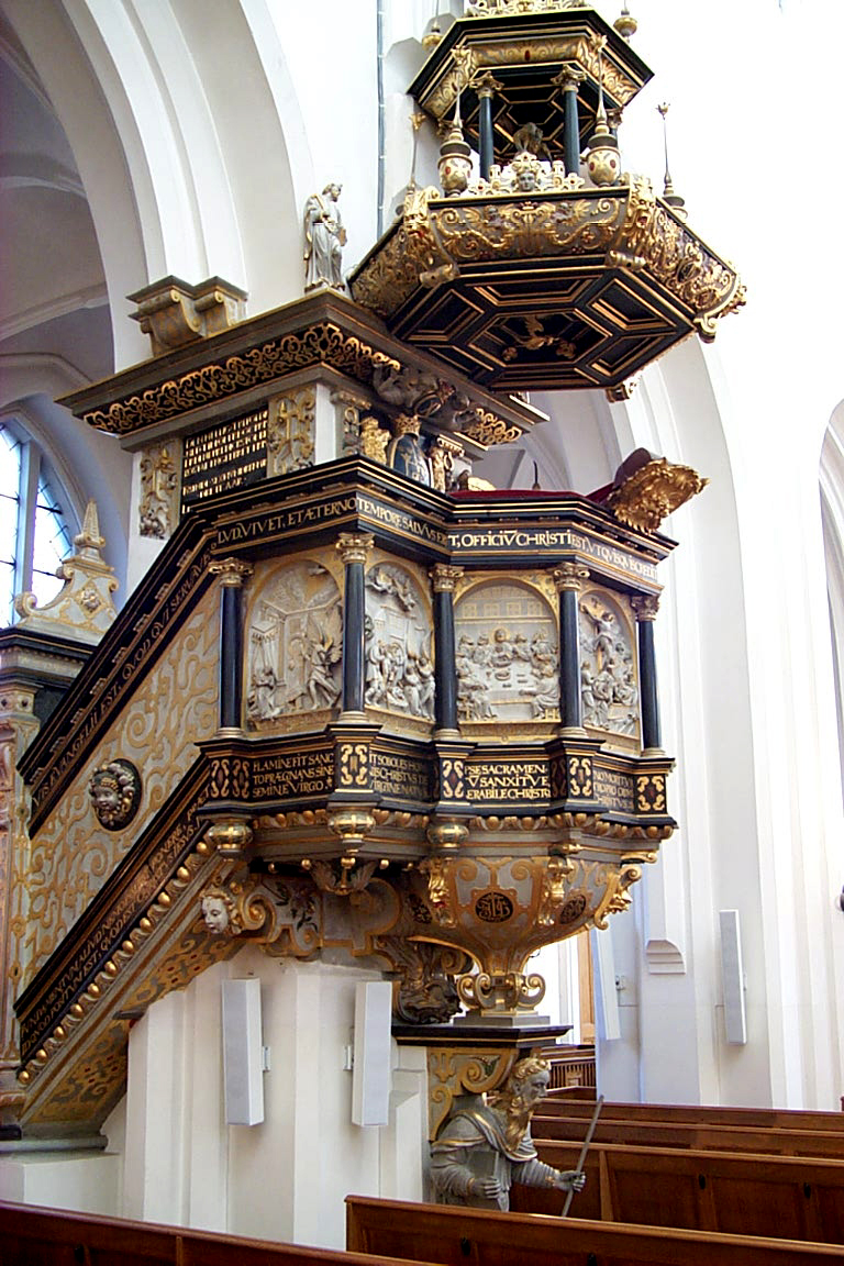 S:t Petri kyrka i Malmö. Predikstolen från 1599.